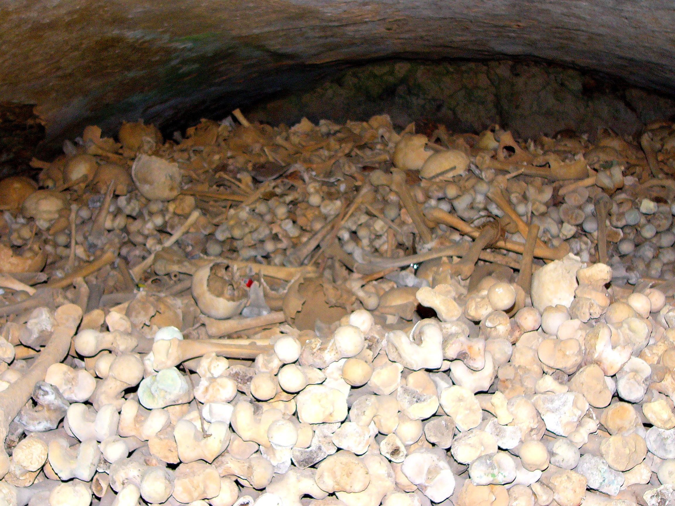 Ossarium mit Gebeinen aus dem ehemaligen Friedhof. Ursprünglich Totenkapelle.This is a photograph of an architectural monument.